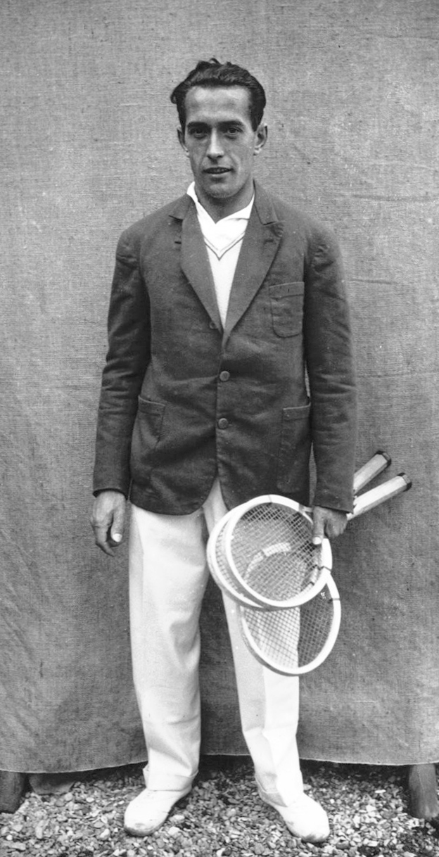 Stade Roland Garros : Championnats internationaux de tennis : Cochet : [photographie de presse] / Agence Meurisse